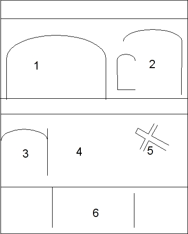 Disposition des fresques sur le mur nord du chœur de l'église Saint-Martin de Vic